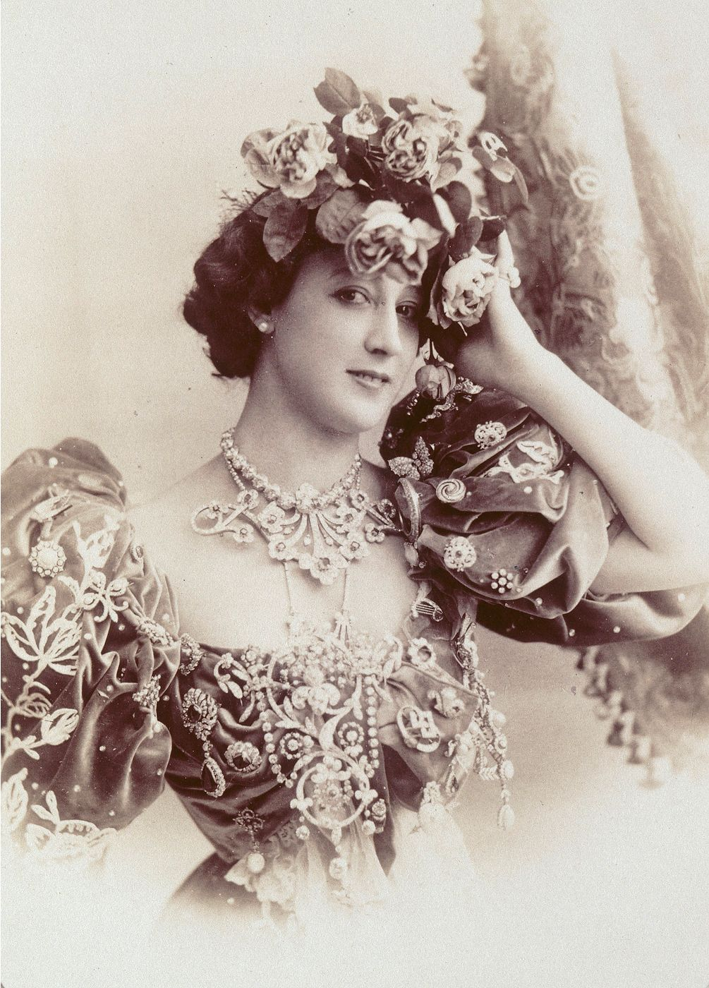 Caroline Otèro (1868−1965)